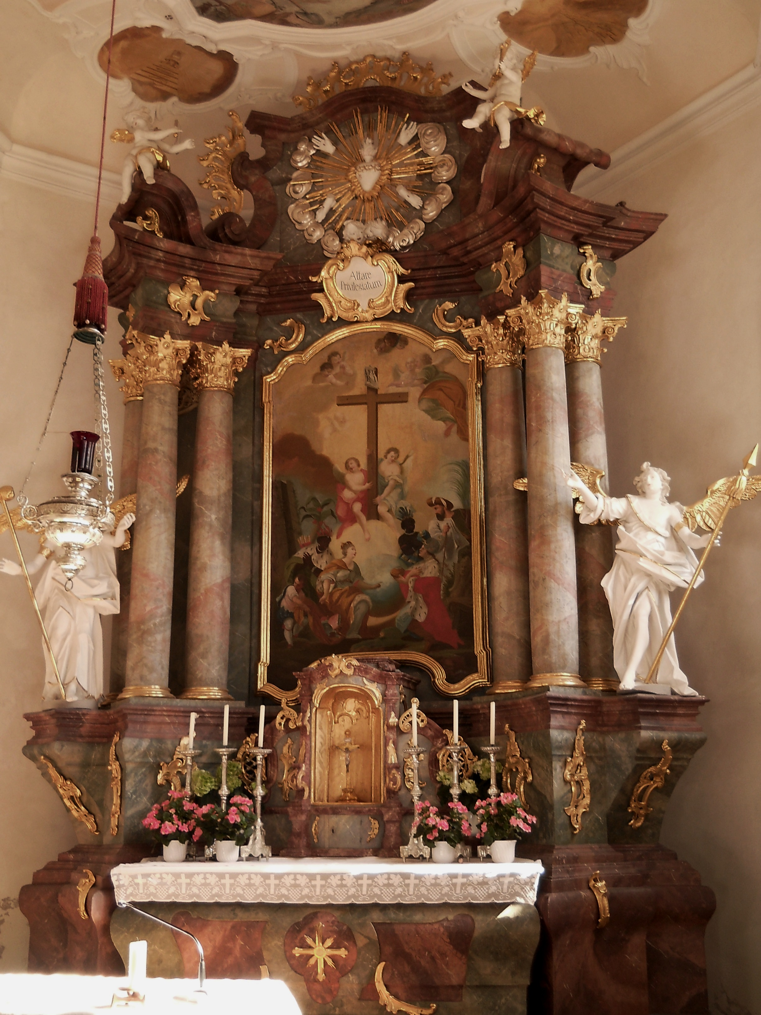 Wallfahrtskirche Hl. Kreuz in Schambach (Kipfenberg), Landkreis Eichstätt, Altarbild von Willibald Wunderer